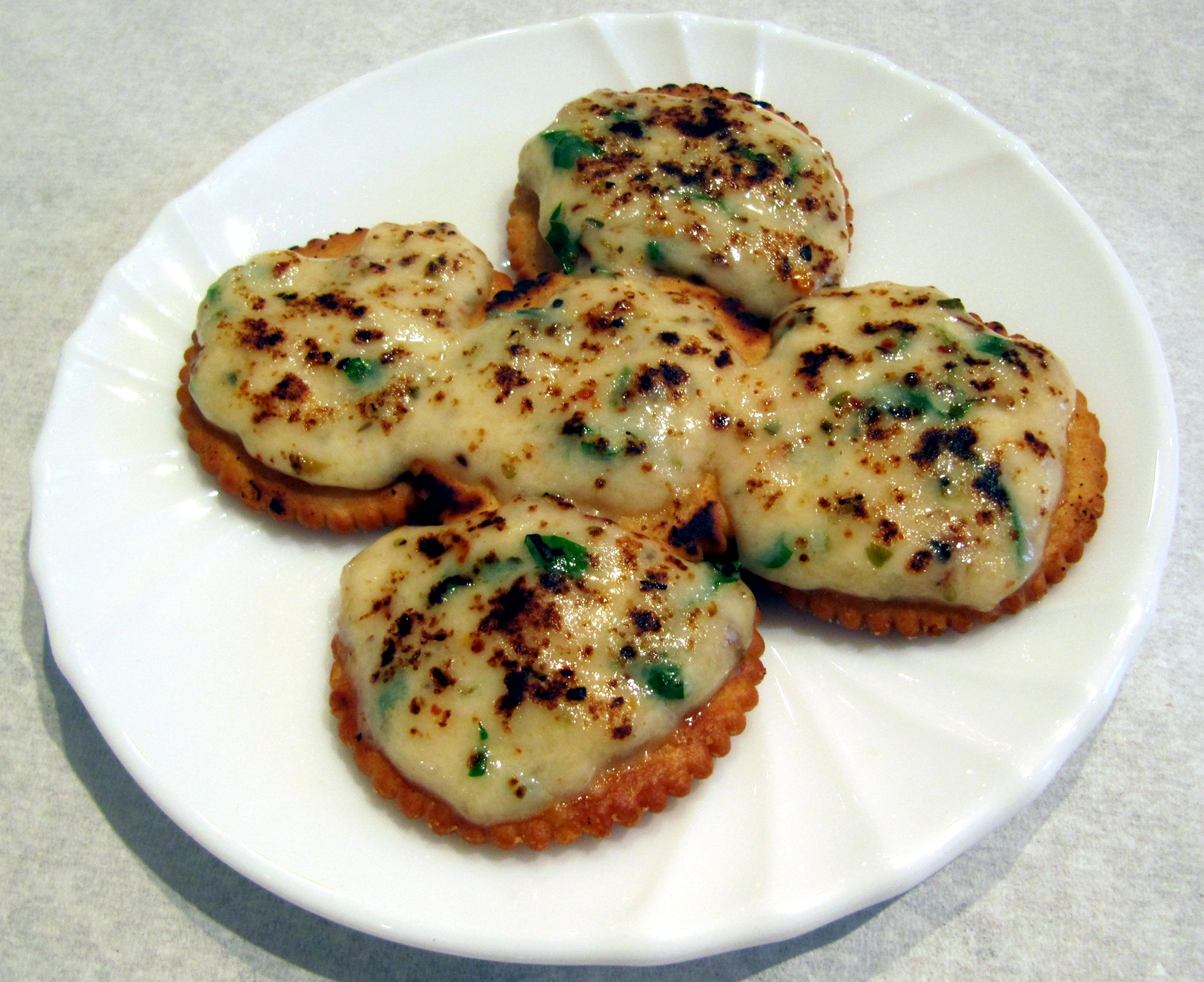 "Welsh rarebit" auf Cracker